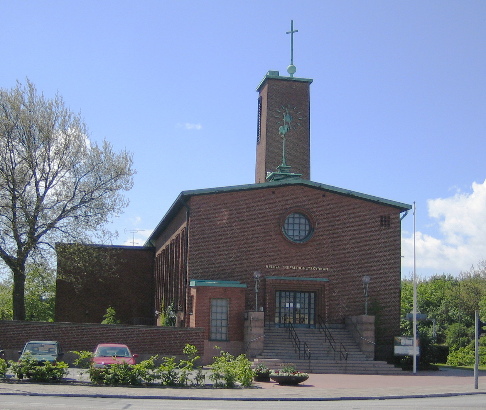 Picture of Heliga Trefaldighetskyrkan, Malmö.